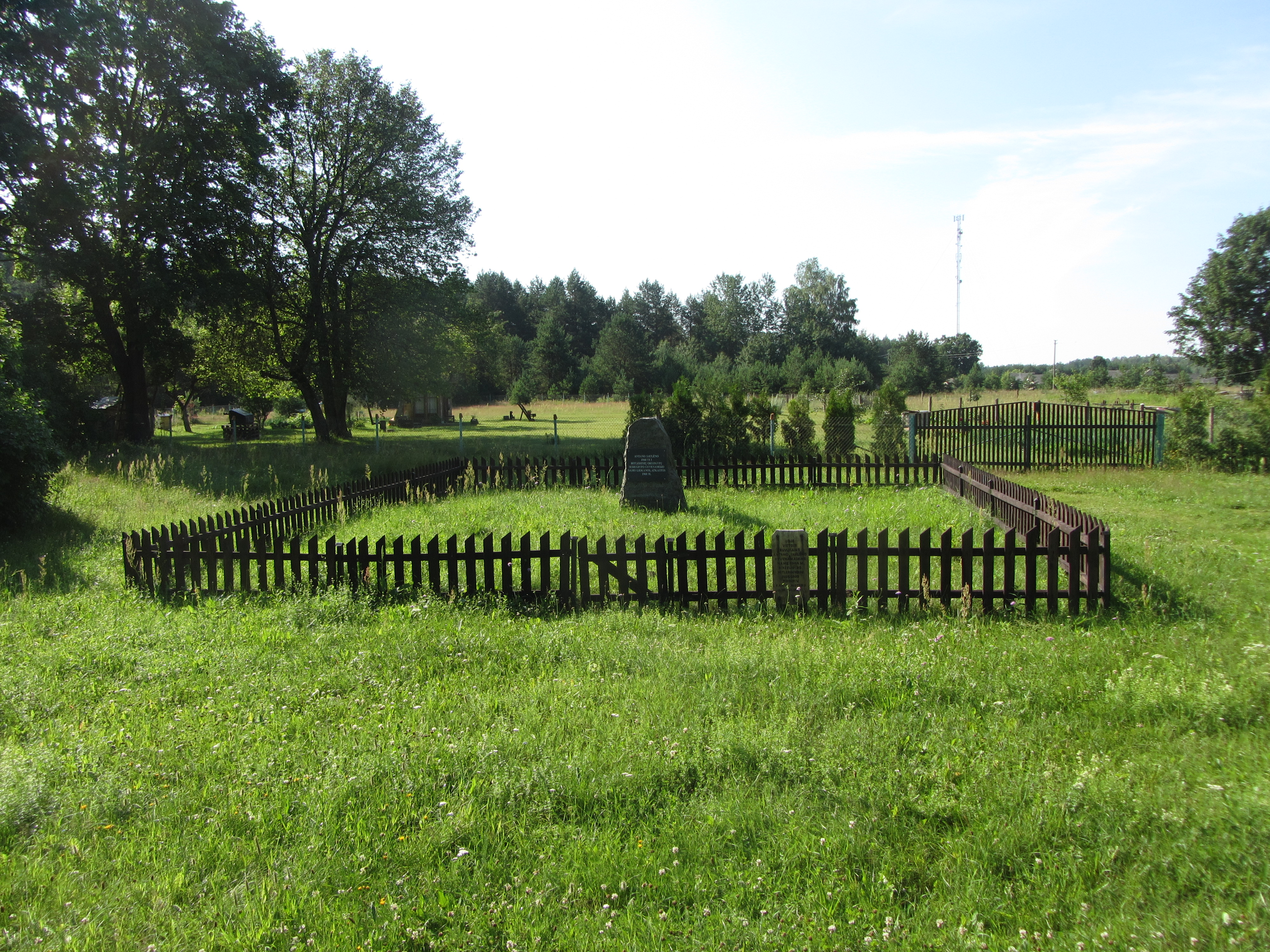 Pirčiupiai 65446, Lithuania